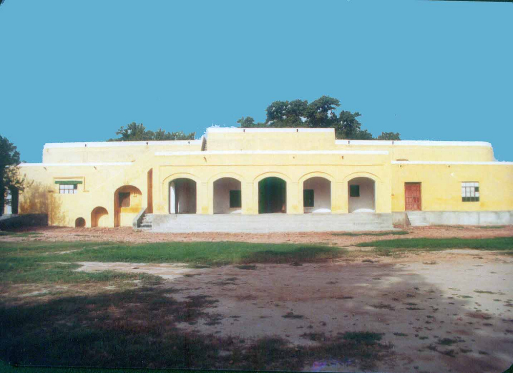 گوگیرہ صدر